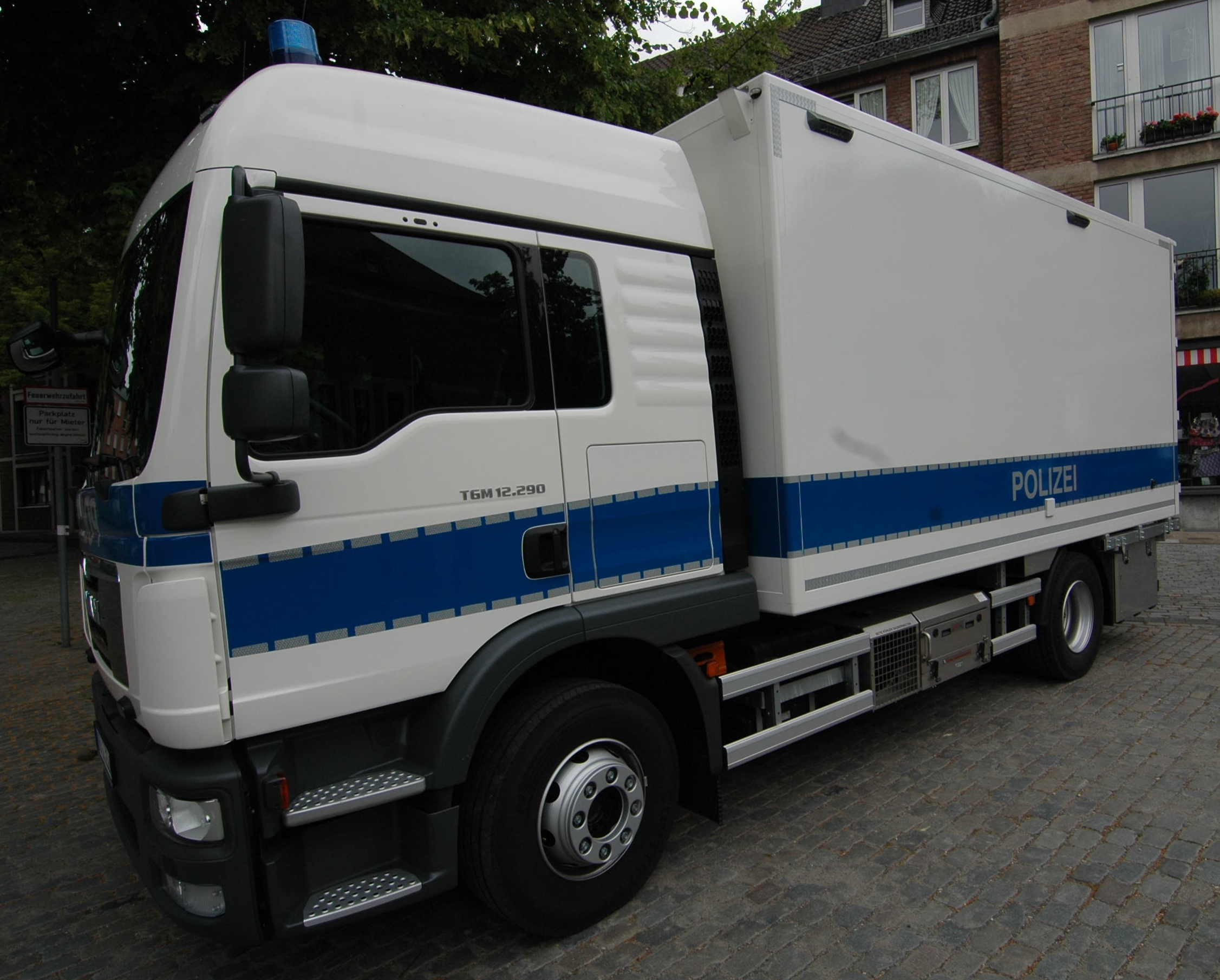 Polizeilaster, Frontansicht, Aachen, NRW